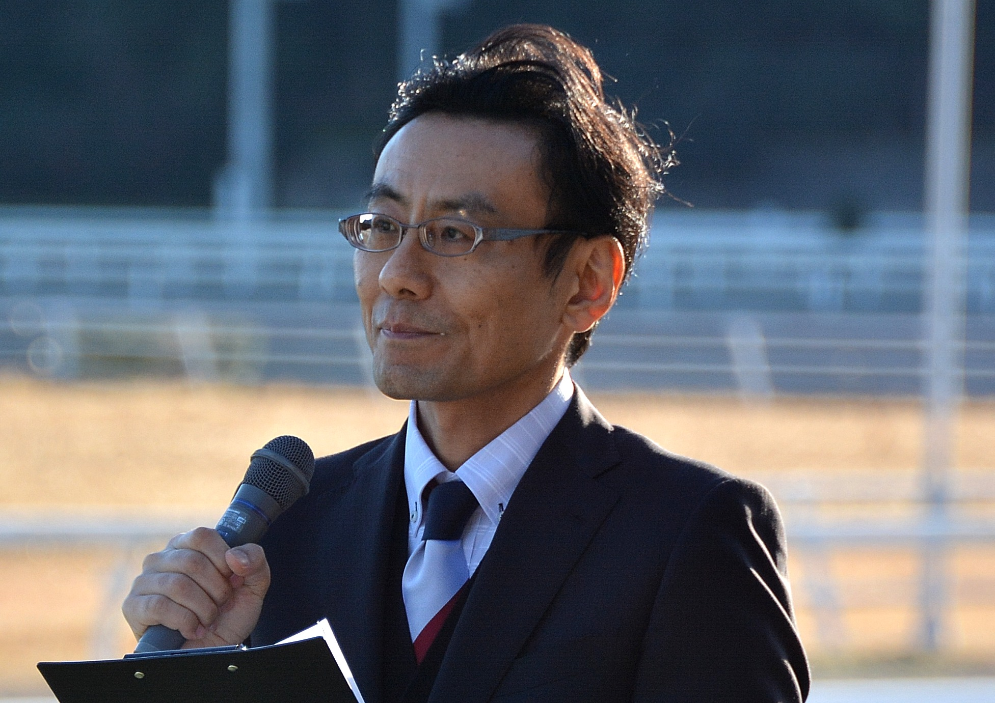 2014年1月15日（水）に高知競馬場で第1競走が終わった後に、高知競馬場のアナウンサーである橋口浩二氏が、「第28回全日本新人王争覇戦」へ出場する騎手の紹介を高知競馬場内の表彰スペースで行っている所を、高知競馬場の観客席から撮影したもの。